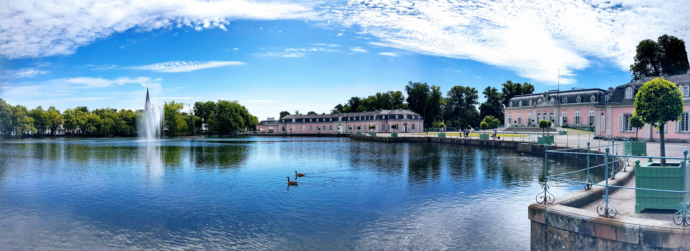 Schloss Benrath mit Flügelgebäuden